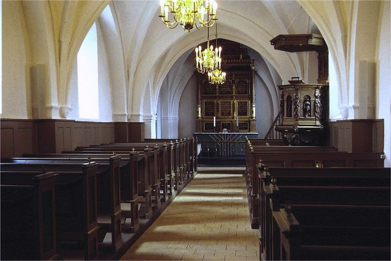 Ejby Kirke (Køge Kommune) i Danmark. Skibet set mod øst